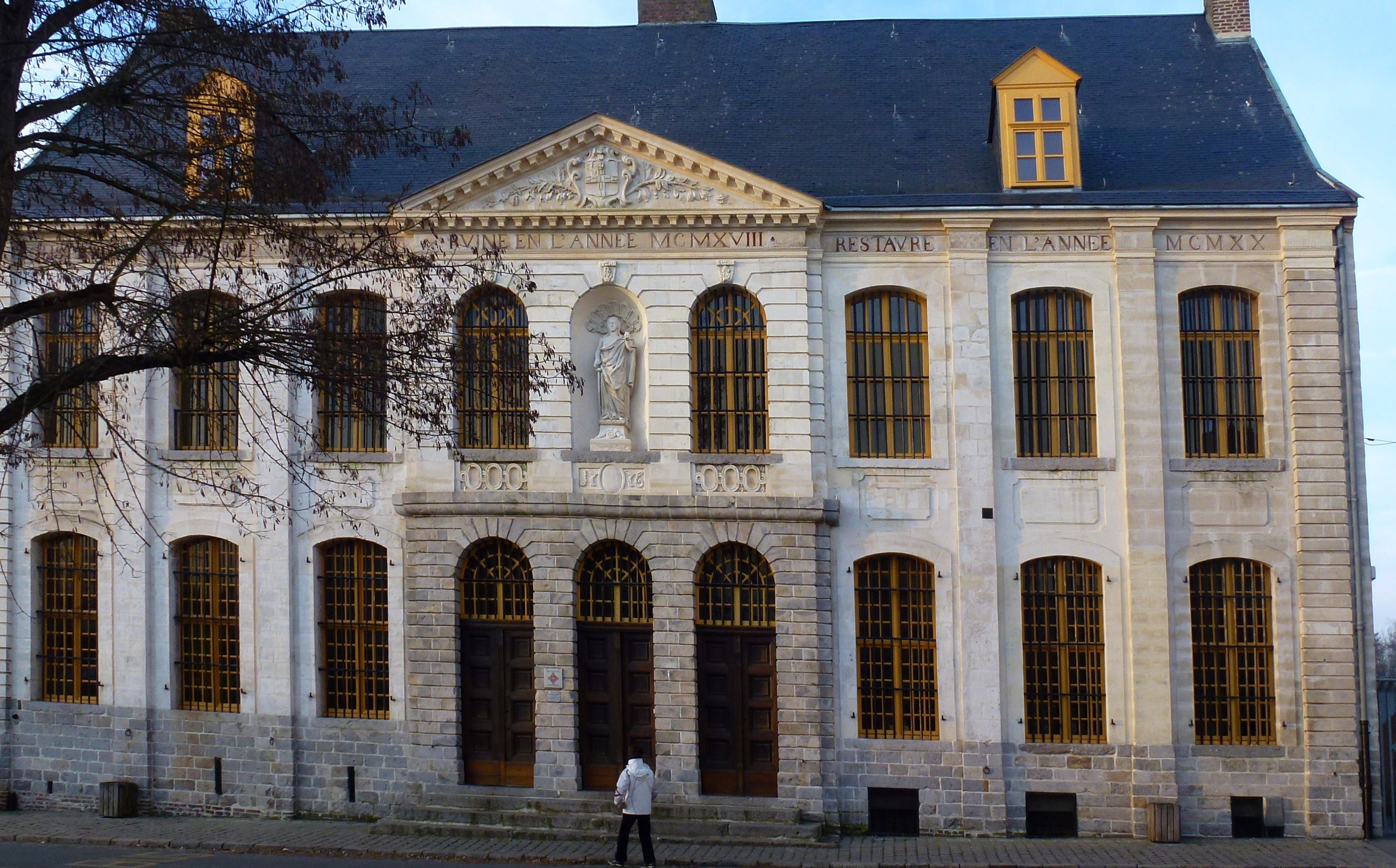 Le présidial de Flandre à Bailleul Nord.- Nord-Pas-de-Calais .